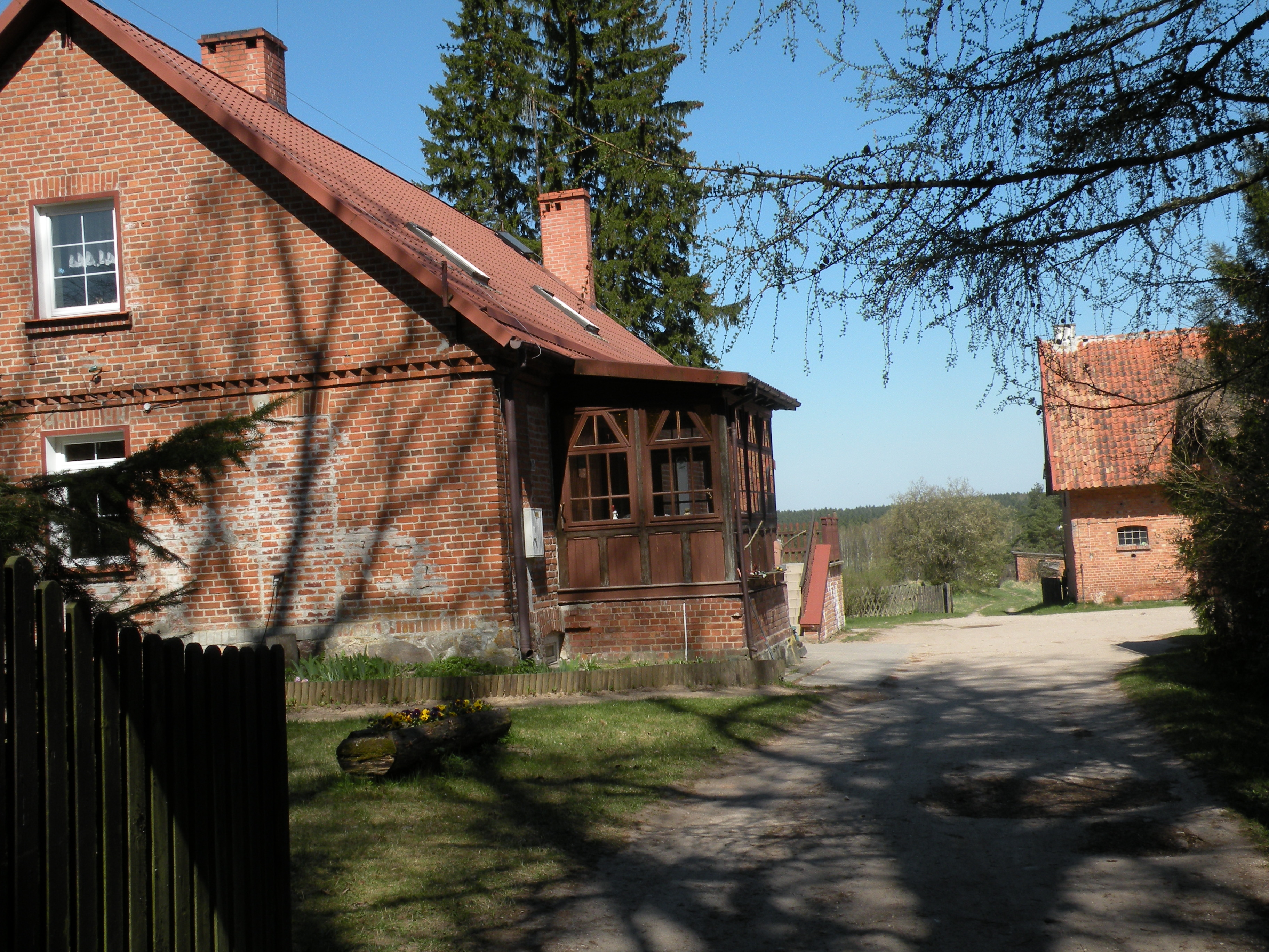 Lesniczówka Nerwik